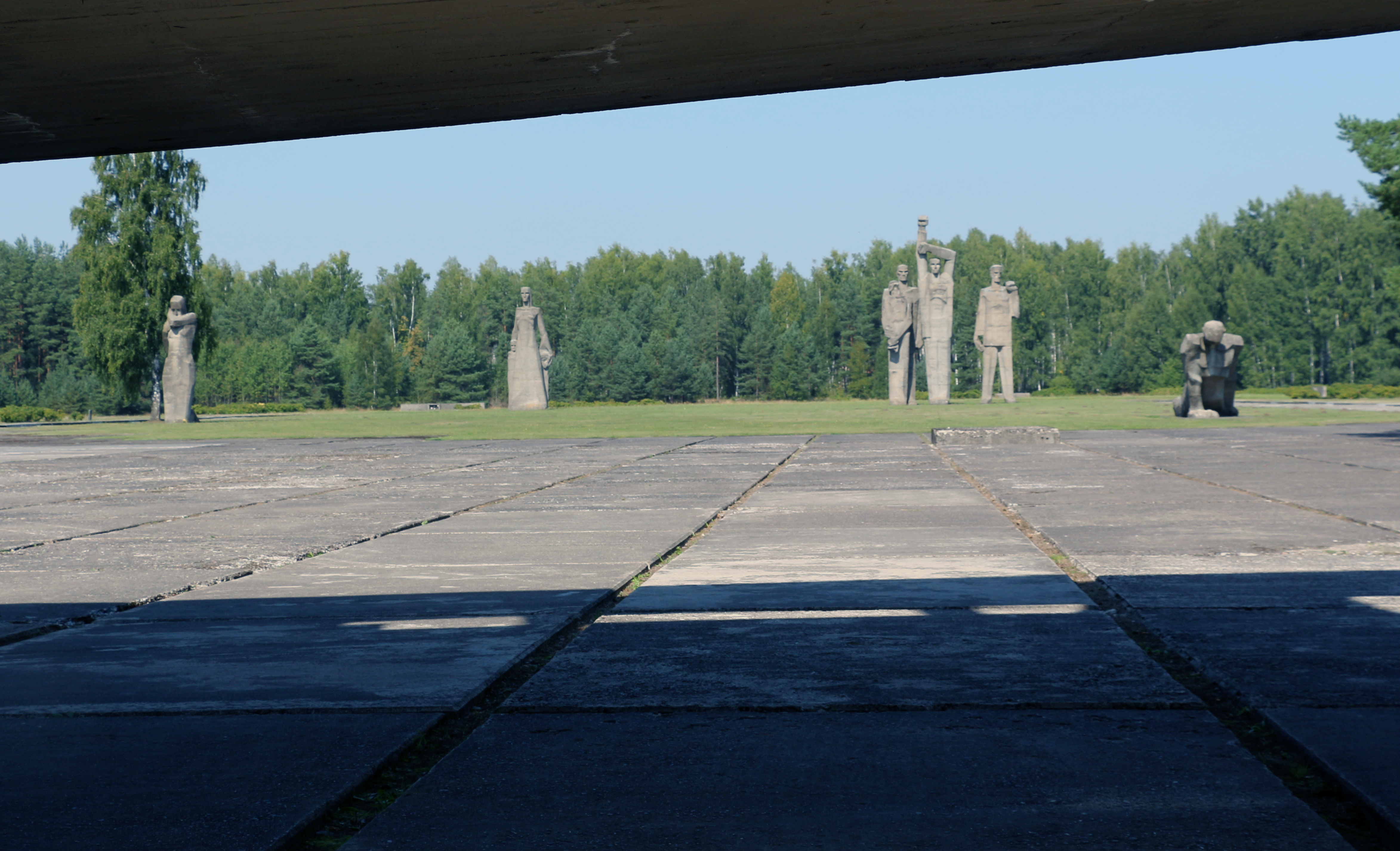 Salaspils Holokaustgedenkstätte